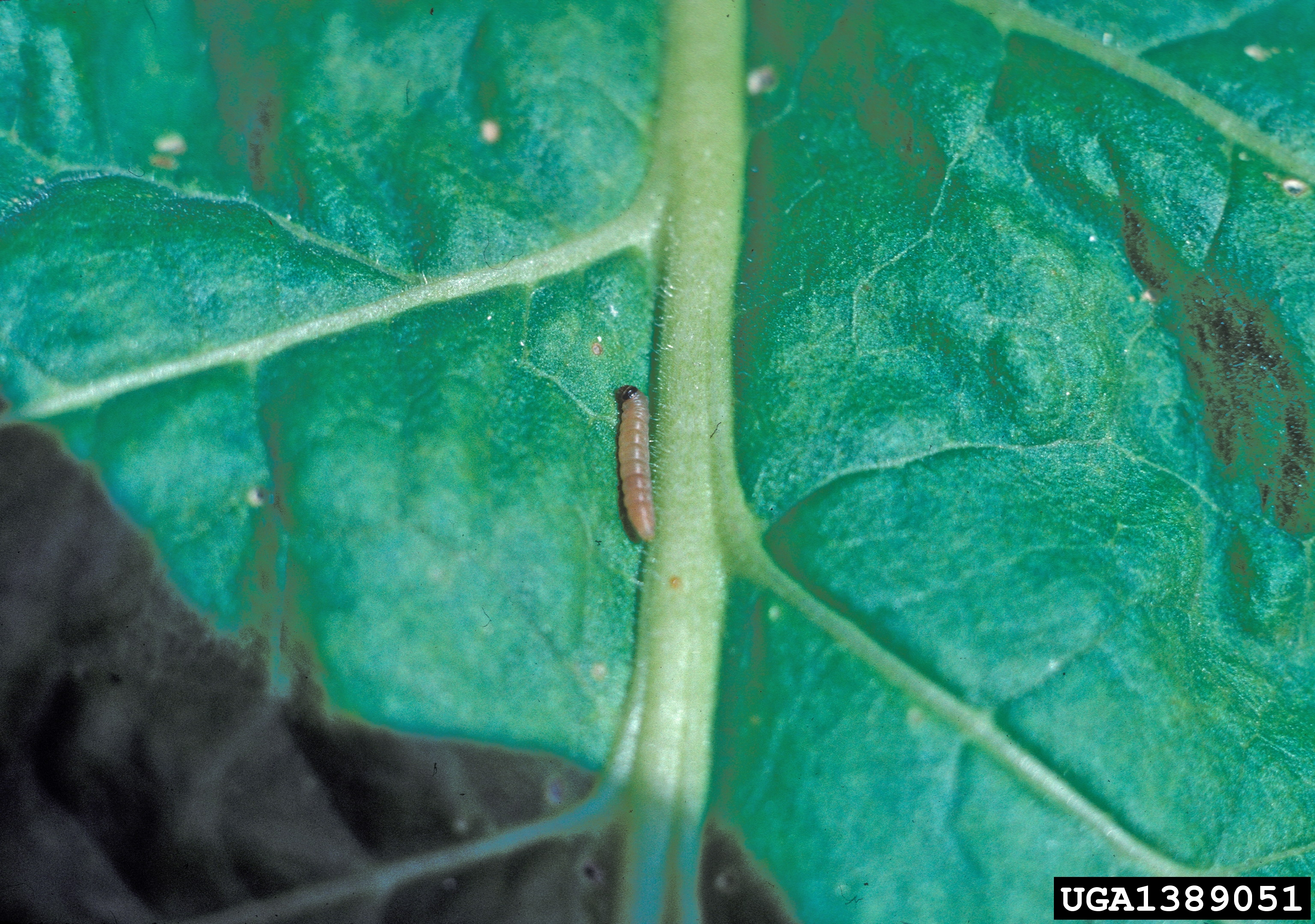 Phthorimaea operculella